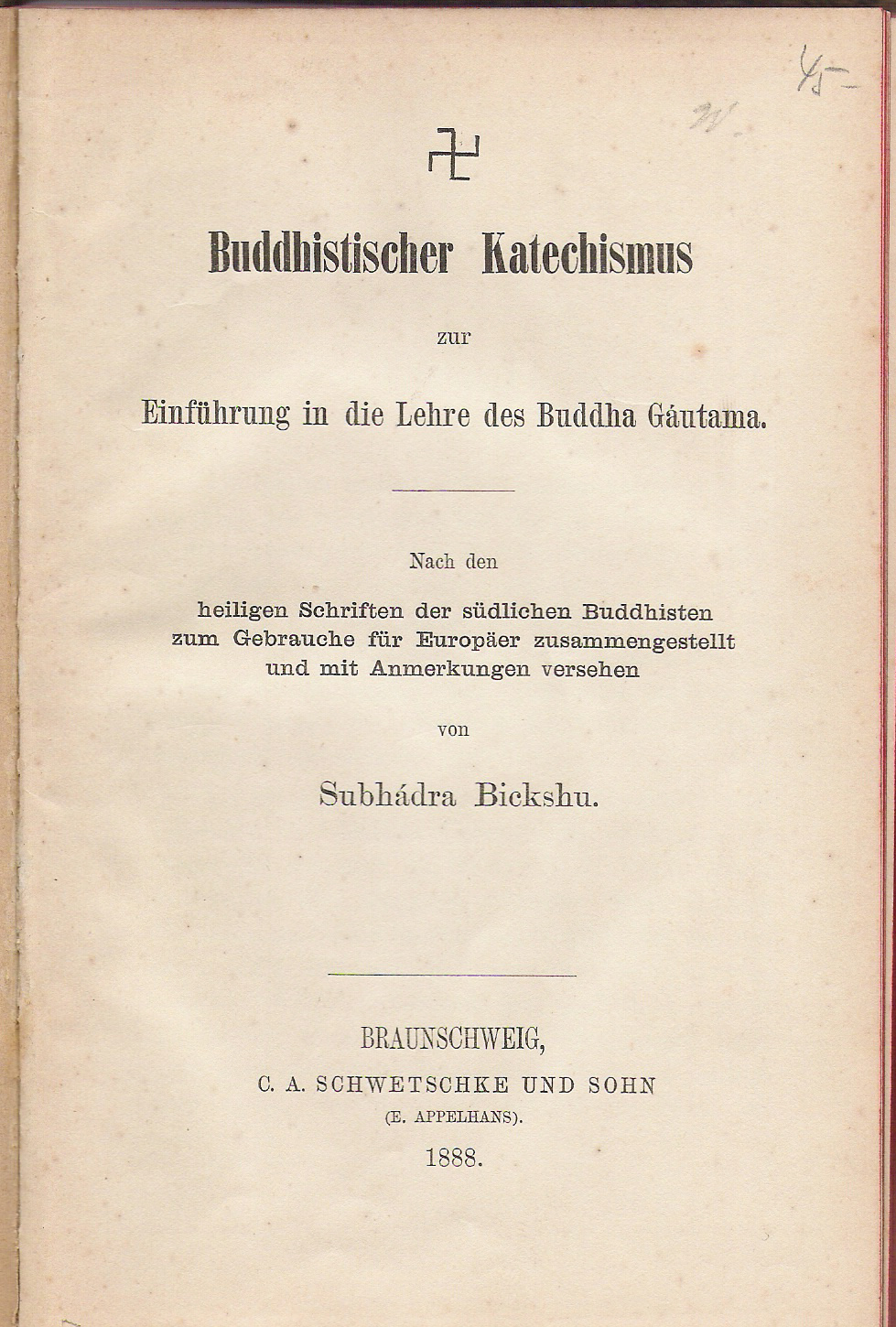 Titelseite des Buches "Buddhistischer Katechismus" von Subhadra Bickshu. 1. Auflage, Braunschweig 1888. Eigener Scan. Gakuro 2005